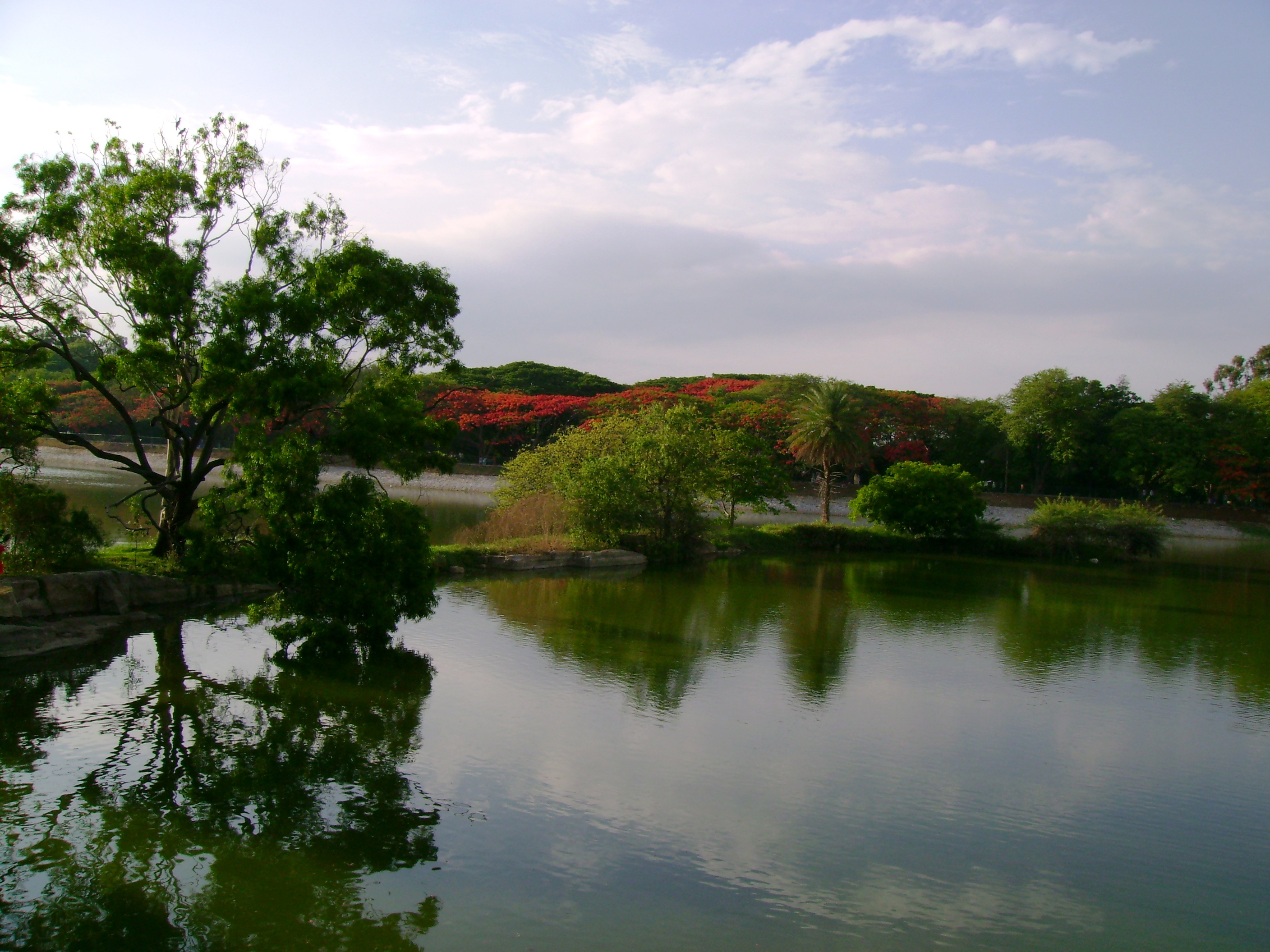 Lake View, Lalbagh [Bangalore, India]